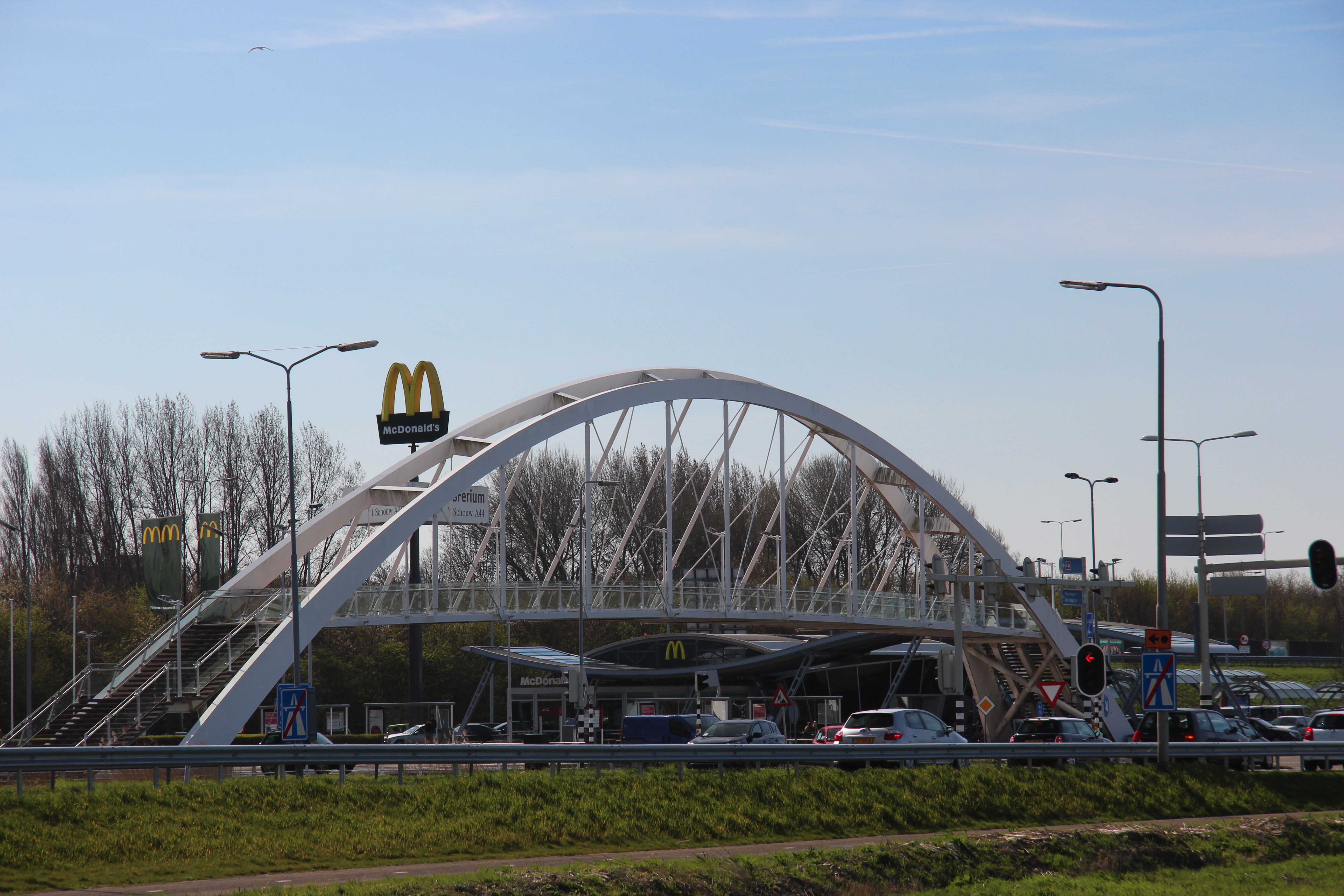 Transferium Leiden 't Schouw, Plesmanlaan 102, Leiden